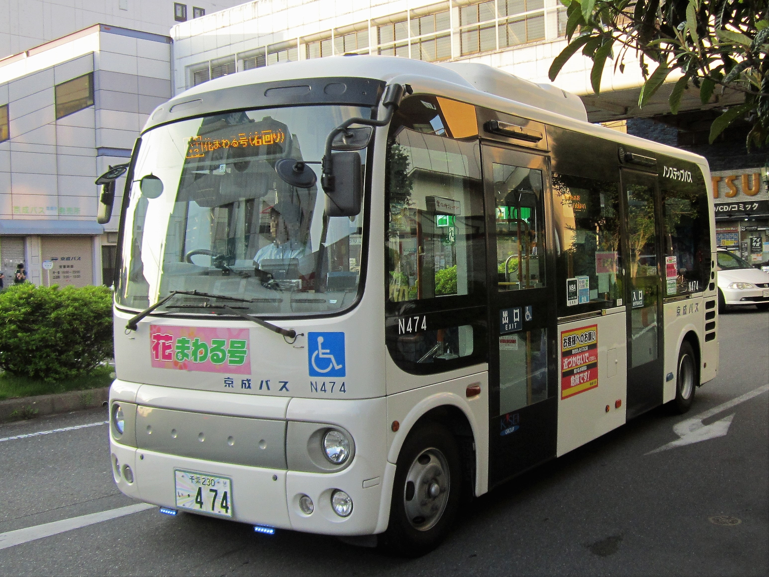 八千代台駅付近を走行する京成バス「花まわる号」